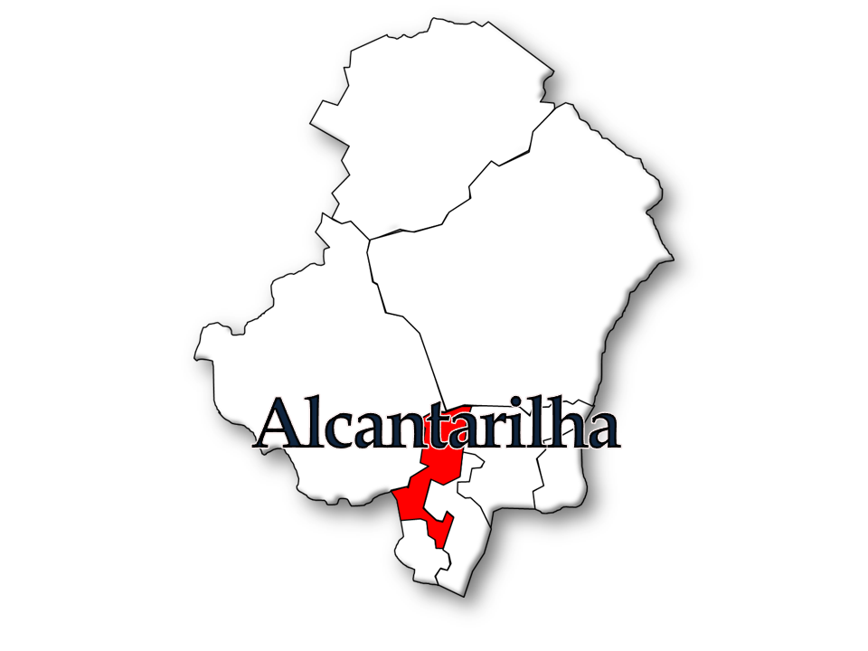 Censos 1864/2011